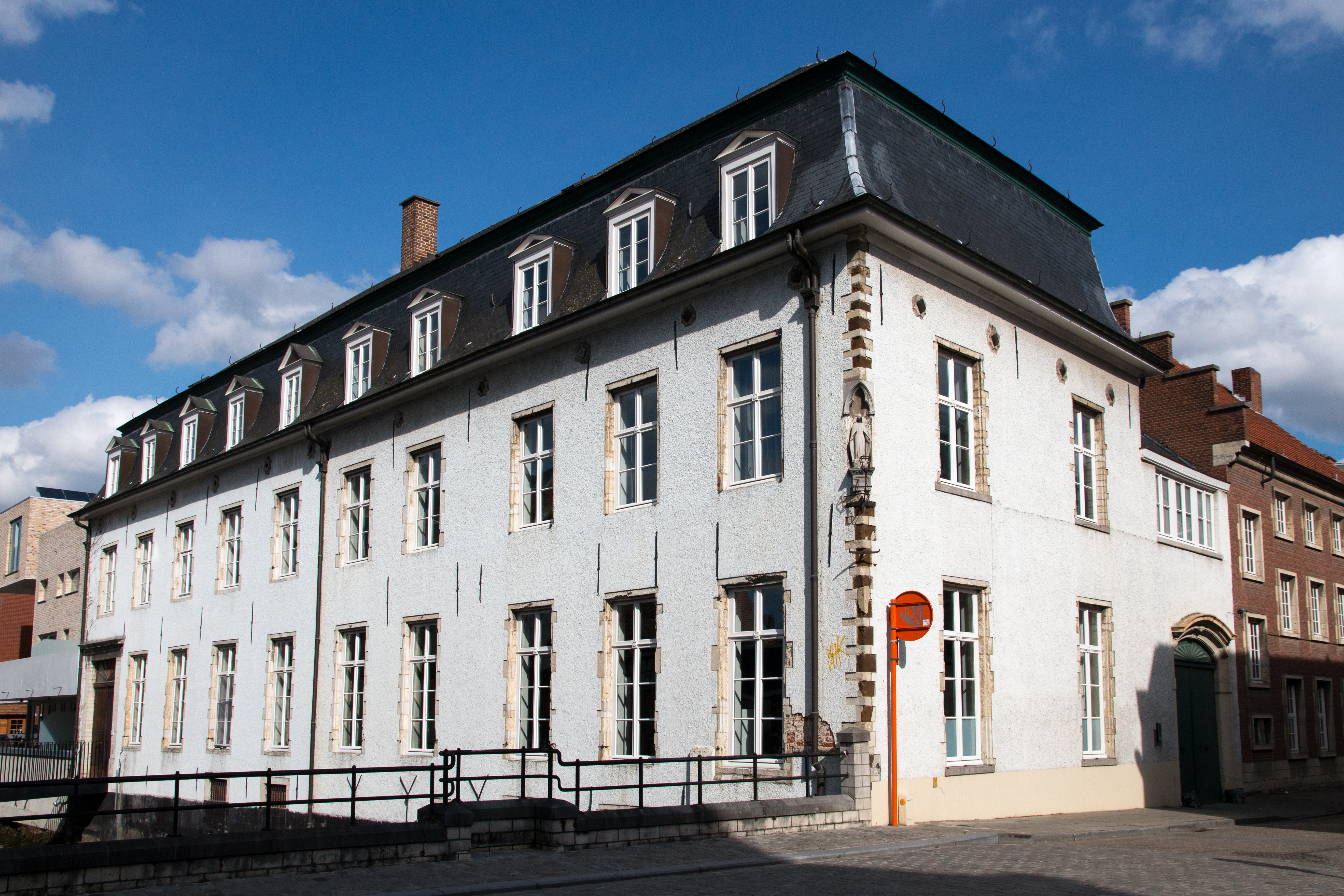 Leuven Hoekpand Halfmaartstraat